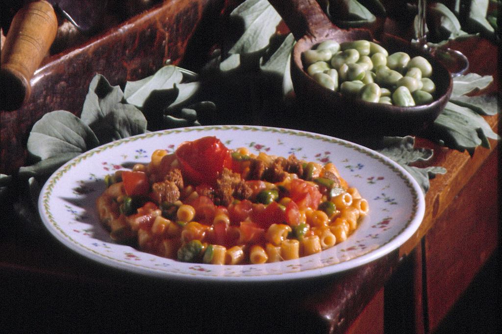 La Favô, piatto tradizionale valdostano.